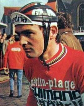 Régis Delépine (1974), 'Sprint 74', Panini figurina n°114.